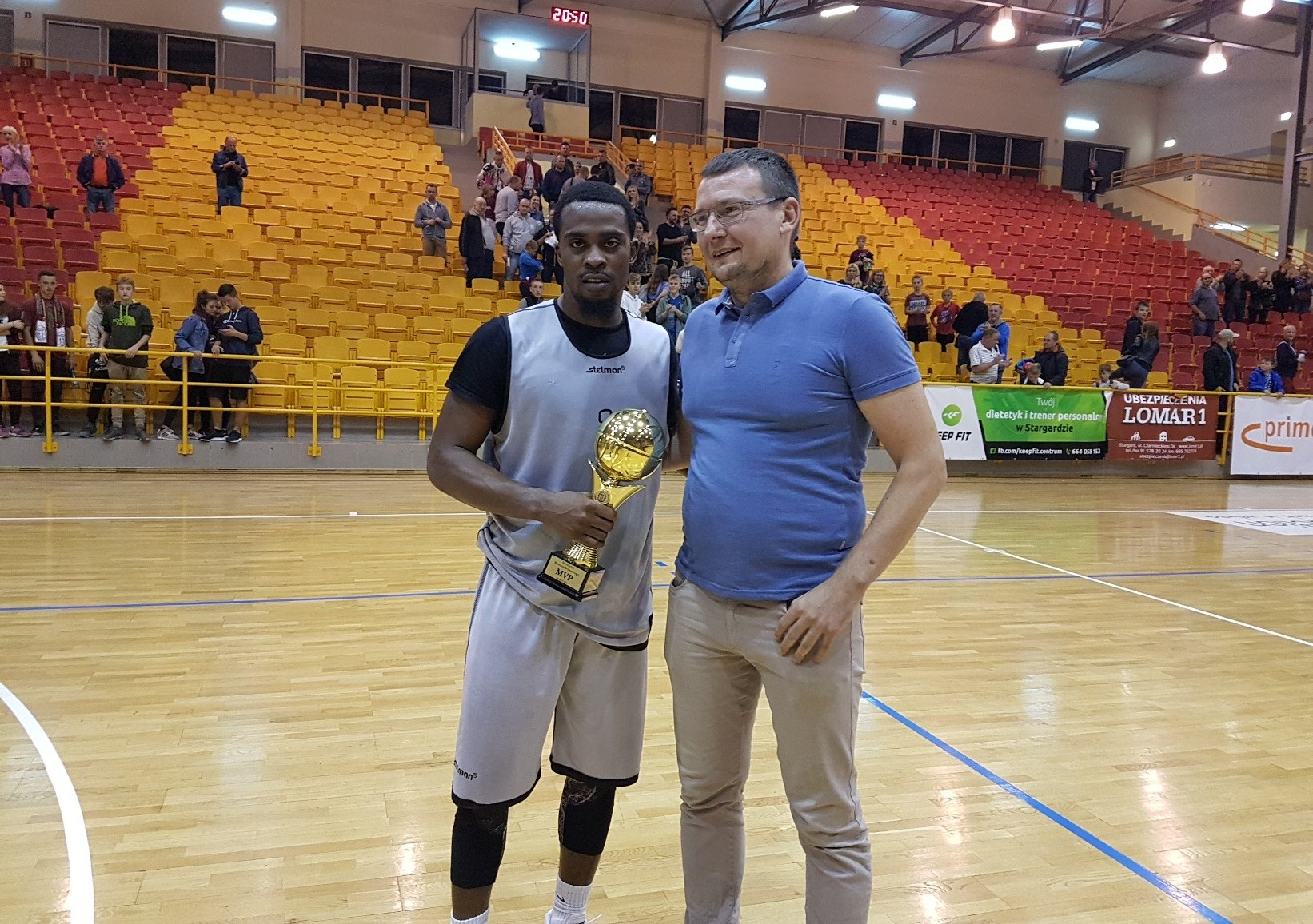 Memoriał Romana Wysockiego. Anthony Hickey MVP